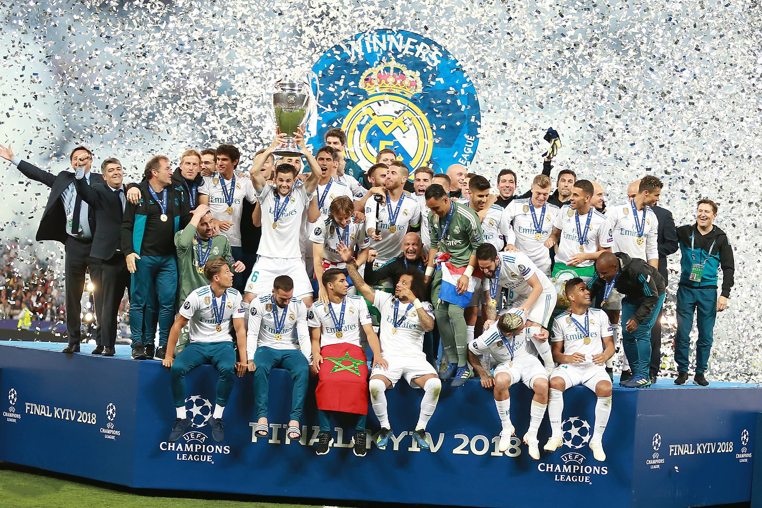 Финал ЛЧ в Киеве: 13-й кубок «Реала» и слёзы «Ливерпуля»